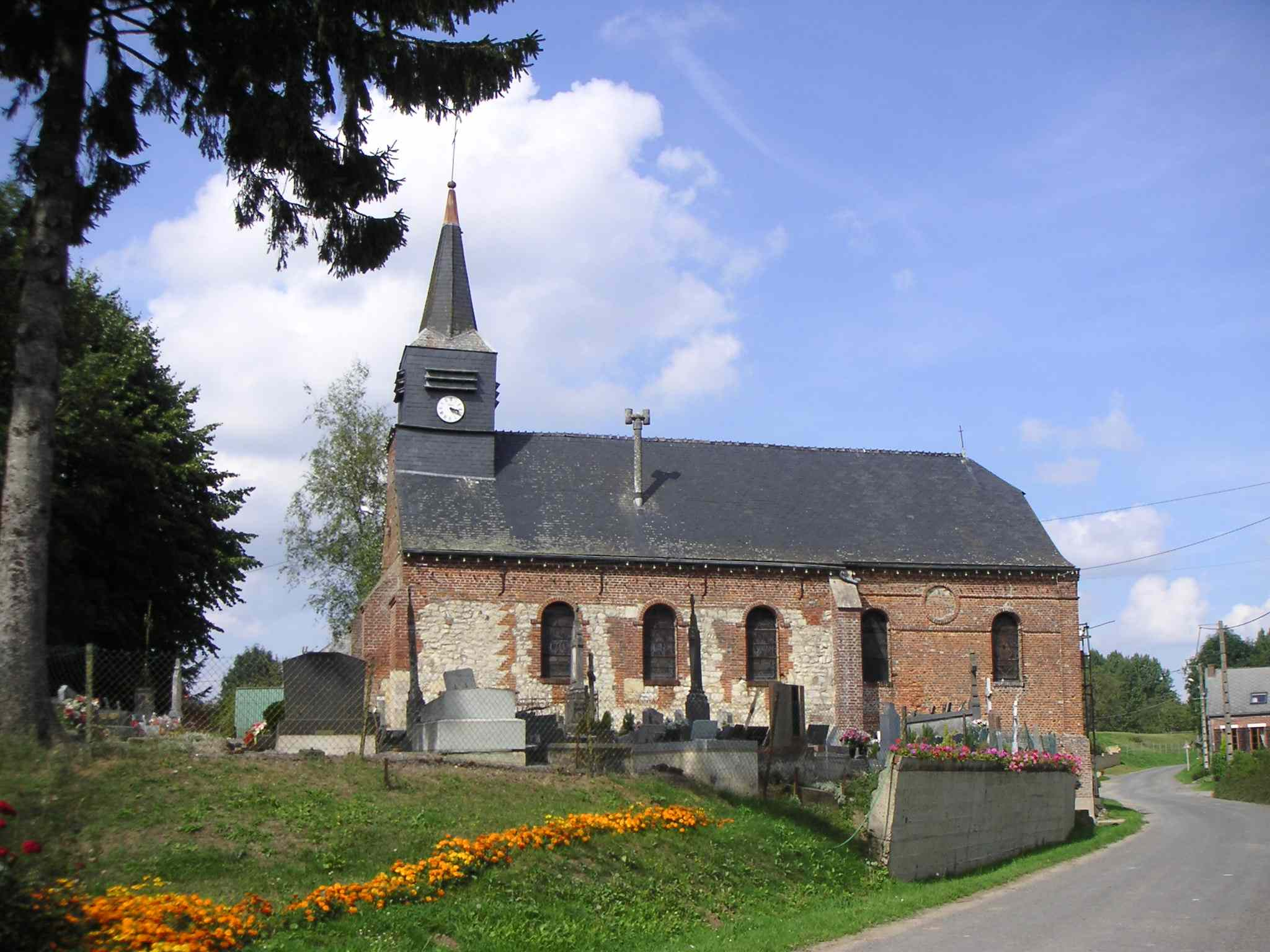 Cette photo de l'église de Colonfay a été prise par User:LonganimE le 02/sept/2005.